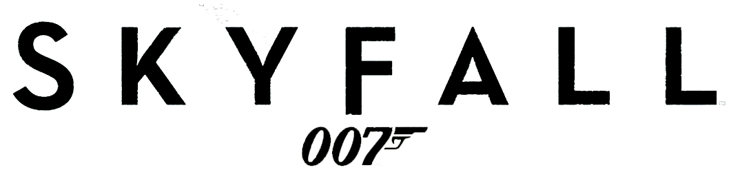 Logotipo usado para la portada del sencillo "Skyfall" de Adele